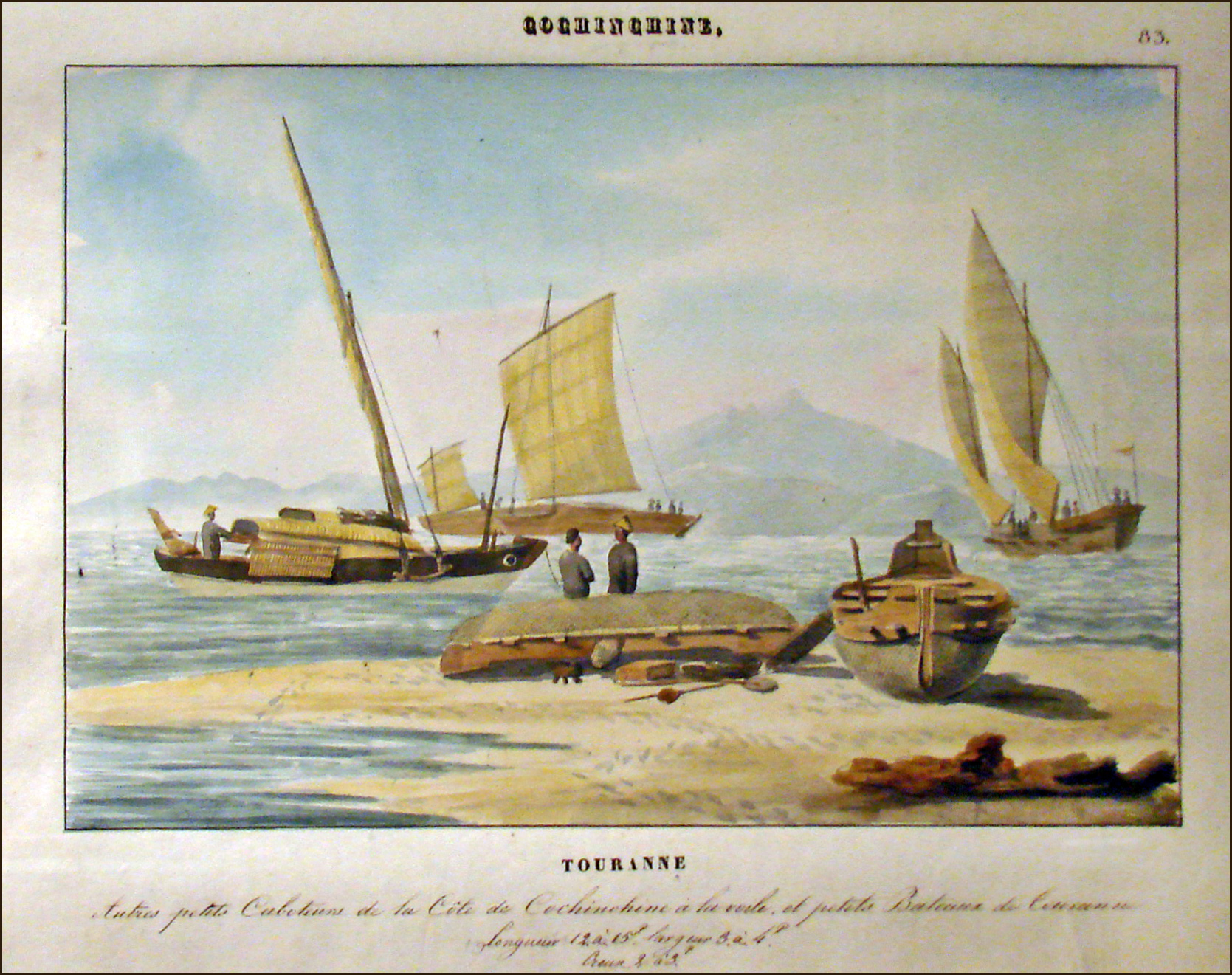 Cochinchine, Touranne (à l'époque de François-Edmond Pâris) Divers bateaux de la baie de Touranne Touranne était le nom de la ville de Da Nang au Vietnam à l'époque coloniale. Collection François-Edmond Pâris Exposition "Tous les bateaux du monde" Musée national de la Marine Paris L'exposition fait partie du programme du festival de l'Imaginaire 2010